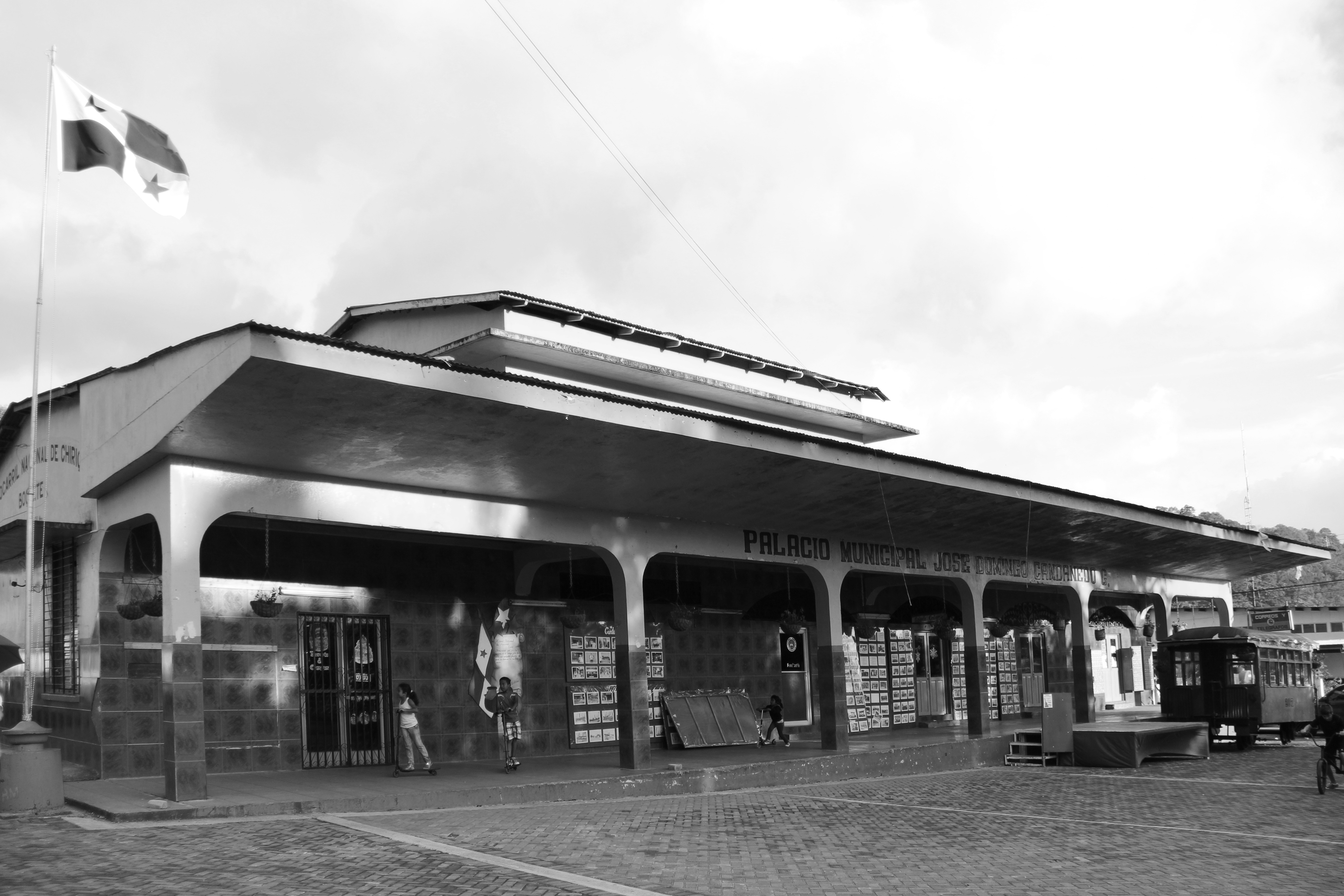 Palacio Municipal José Domingo Candanedo, poblado de Boquete. Provincia de Chiriquí.